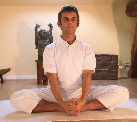 Yoga postures Baddha_konasana